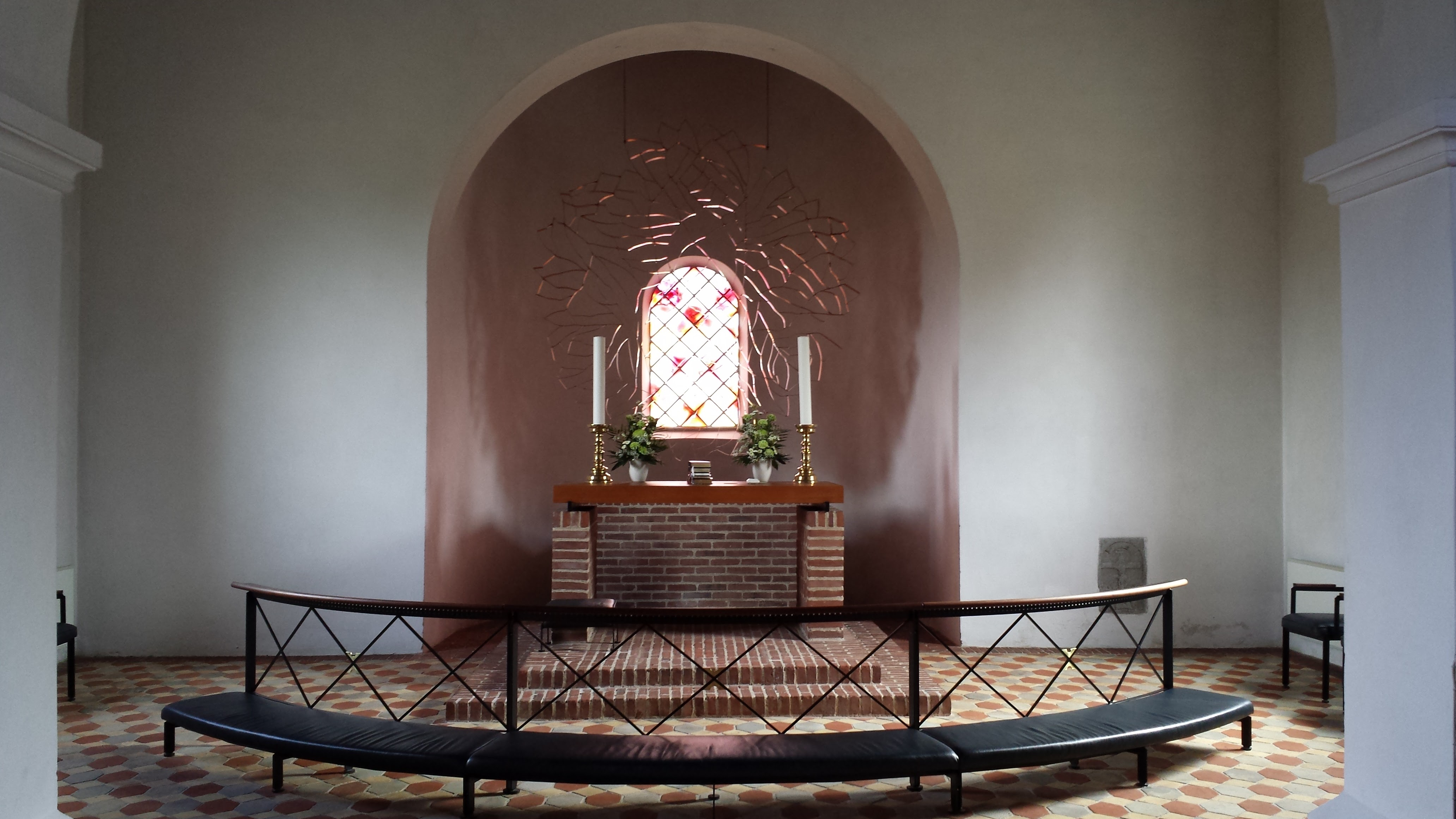 Kor, inkl. alter og altertavle.